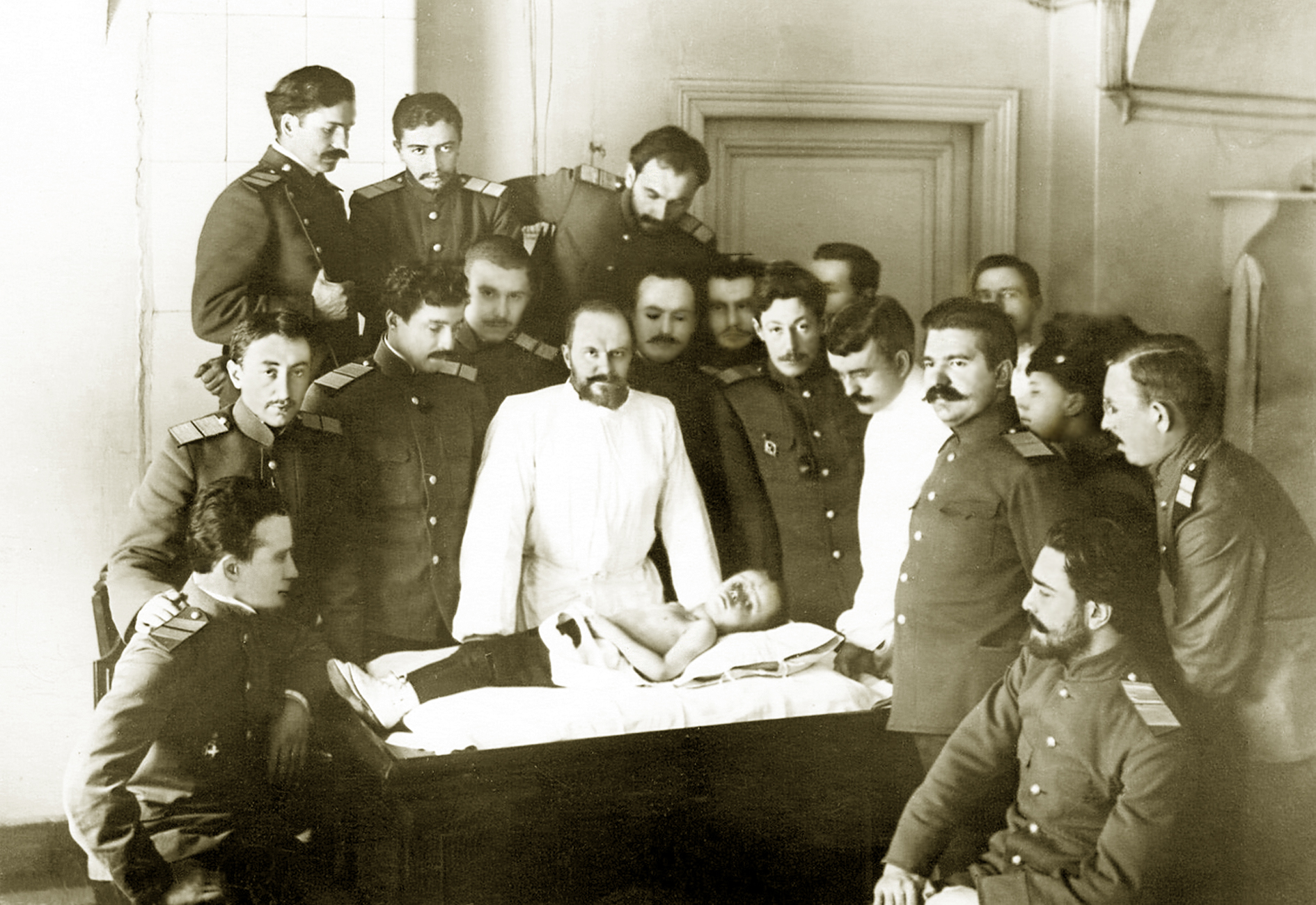 Ординарной профессор кафедры детских болезней ВМА А. Н. Шкарин в клинике со слушателями академии